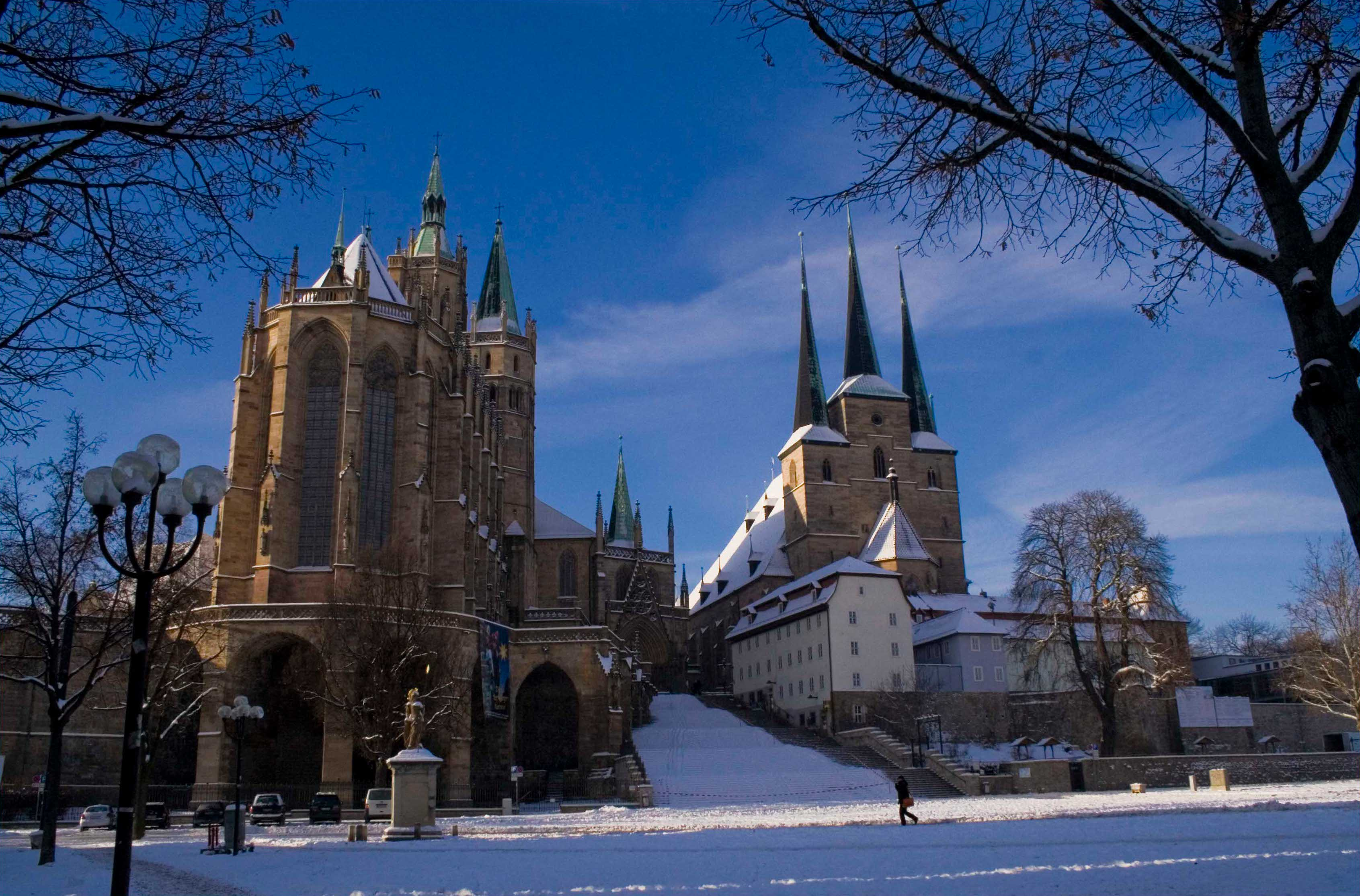 Deutschland Thüringen Erfurt Domplatz